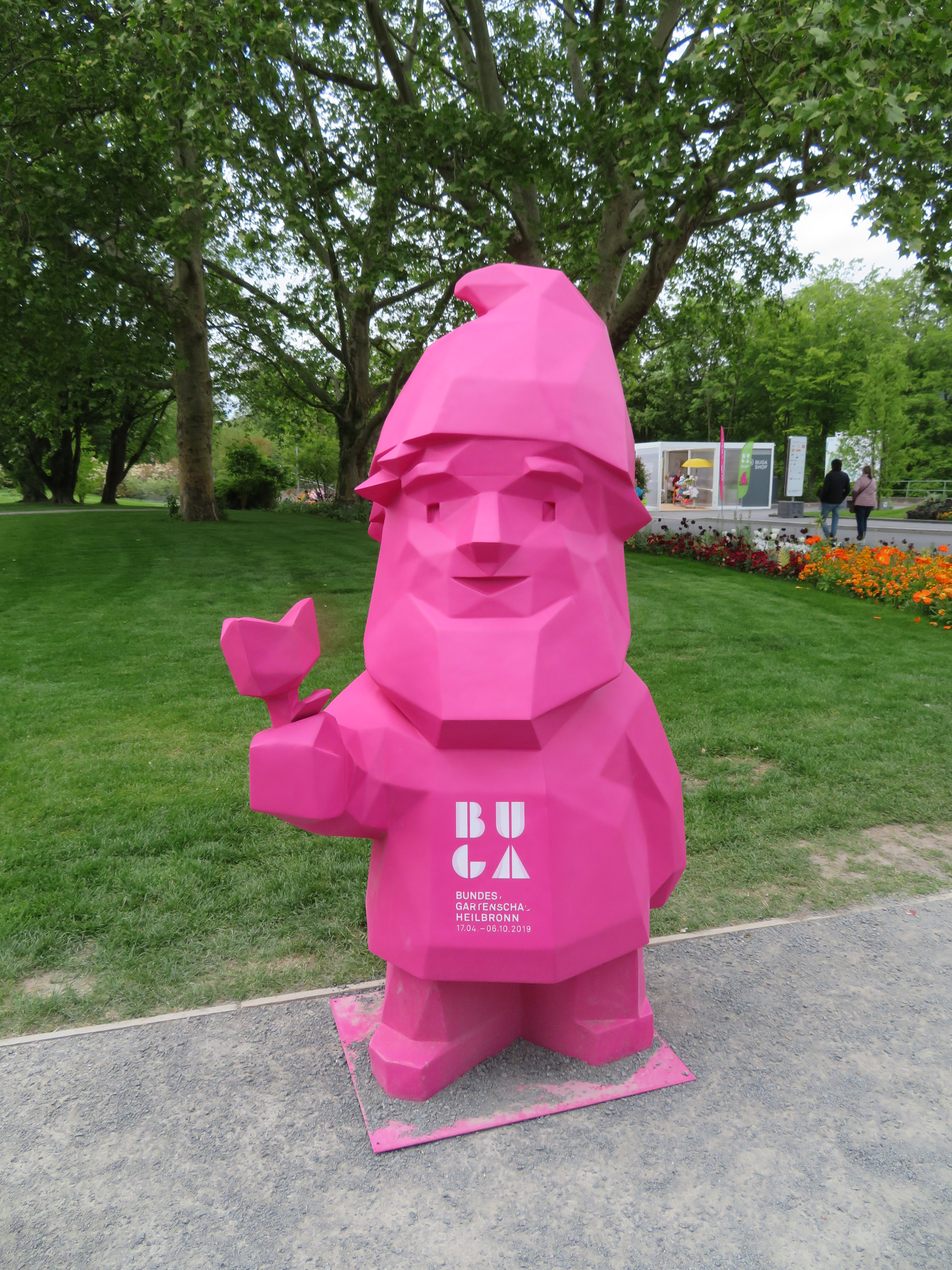 Mai 2019 auf der Bundesgartenschau in Heilbronn